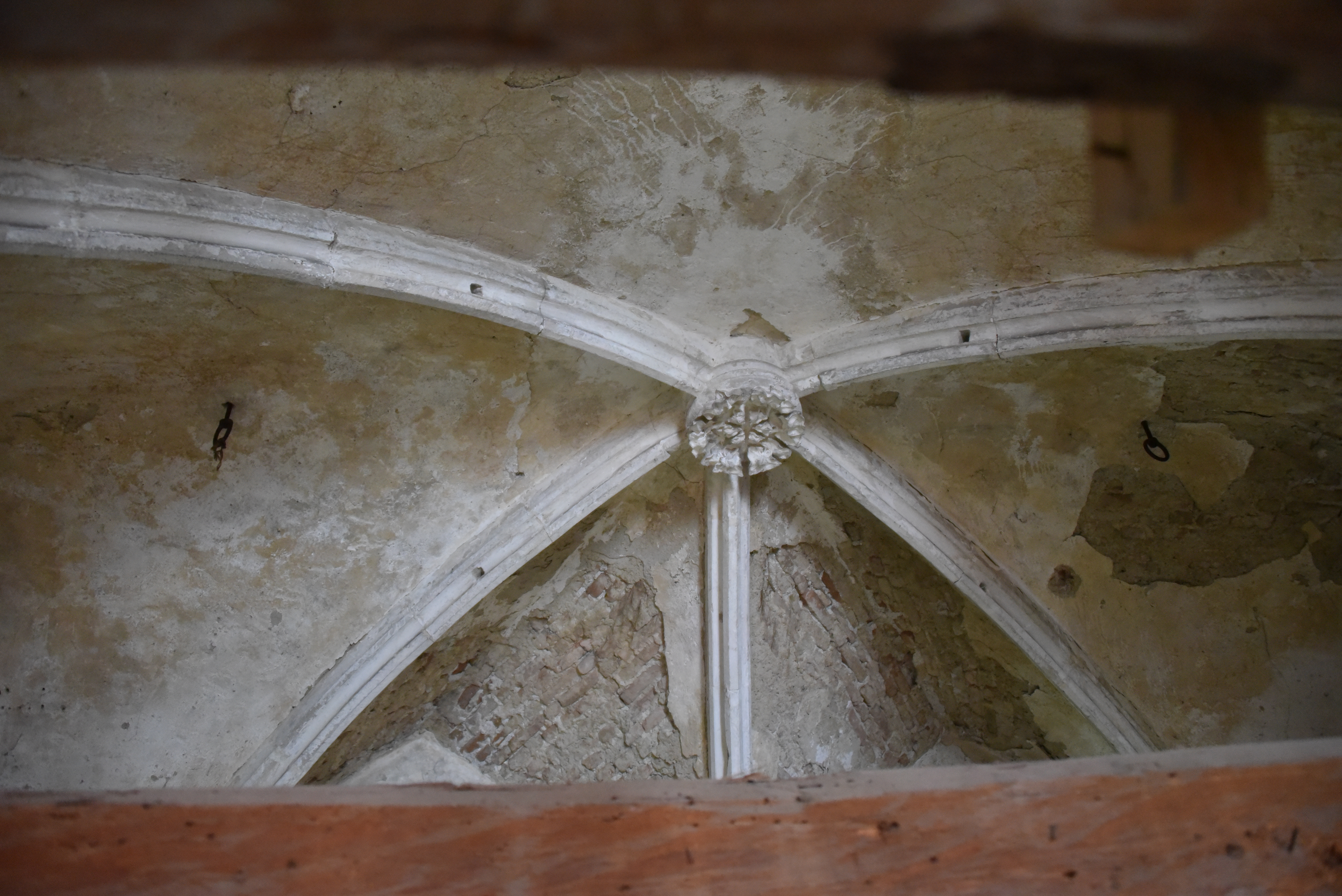 Synagoge Bruck an der Leitha innen